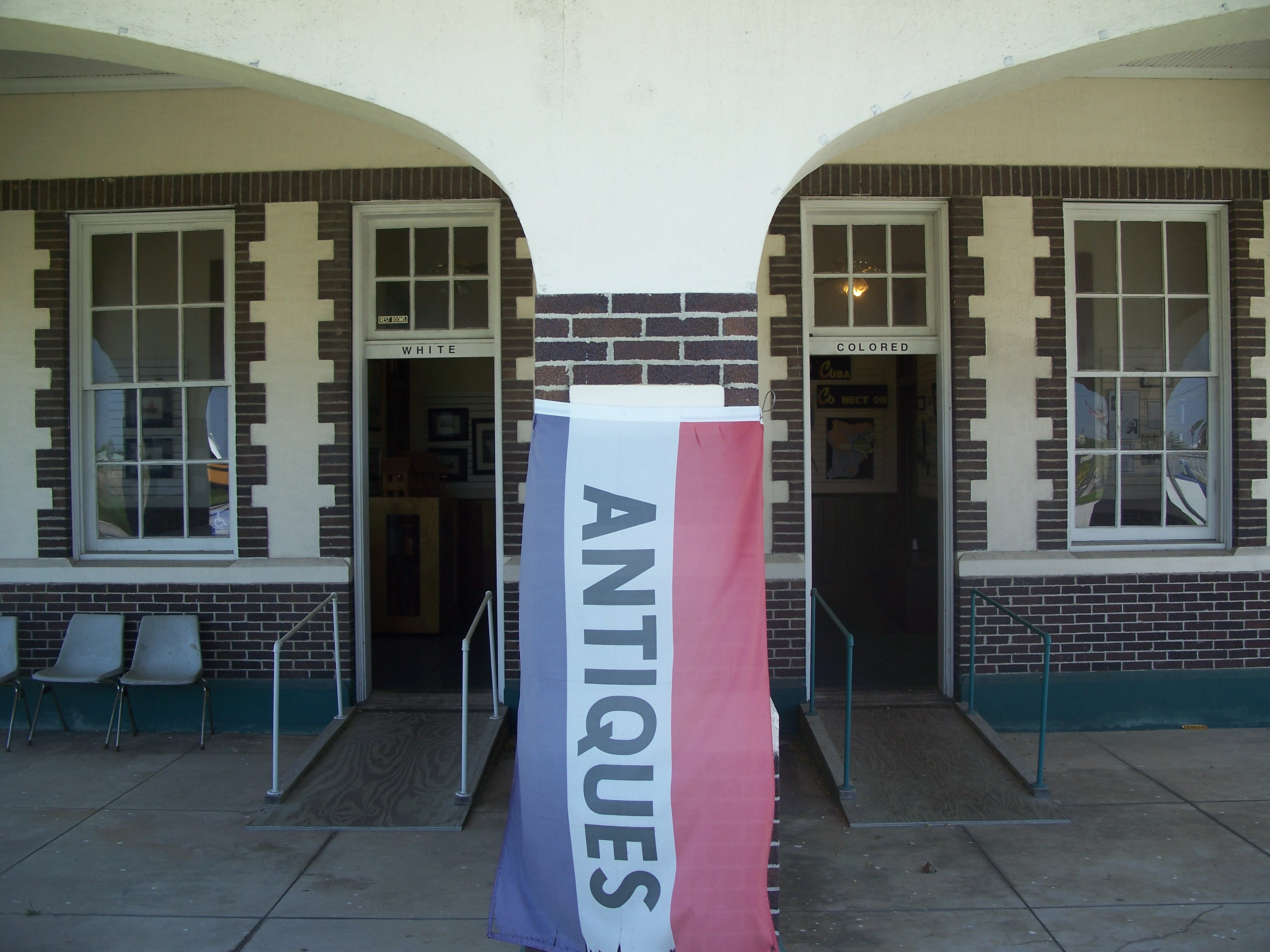 Punta Gorda, Florida: Punta Gorda Atlantic Coast Line Depot